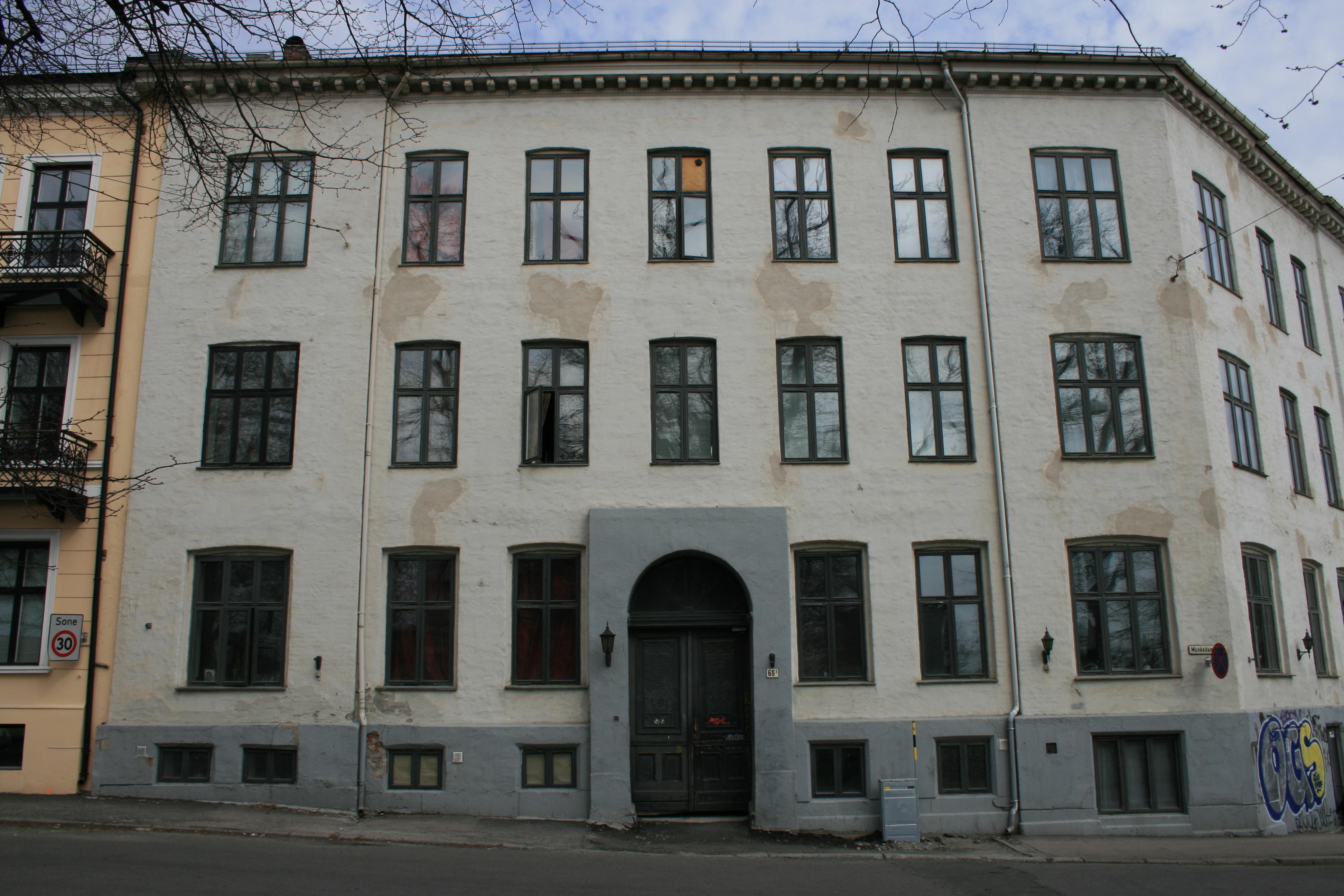 Norsk Tryllemuseum i Munkedamsveien 65B i Oslo.